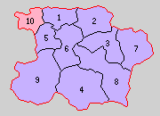 島根県仁多郡の町村制時点の町村。